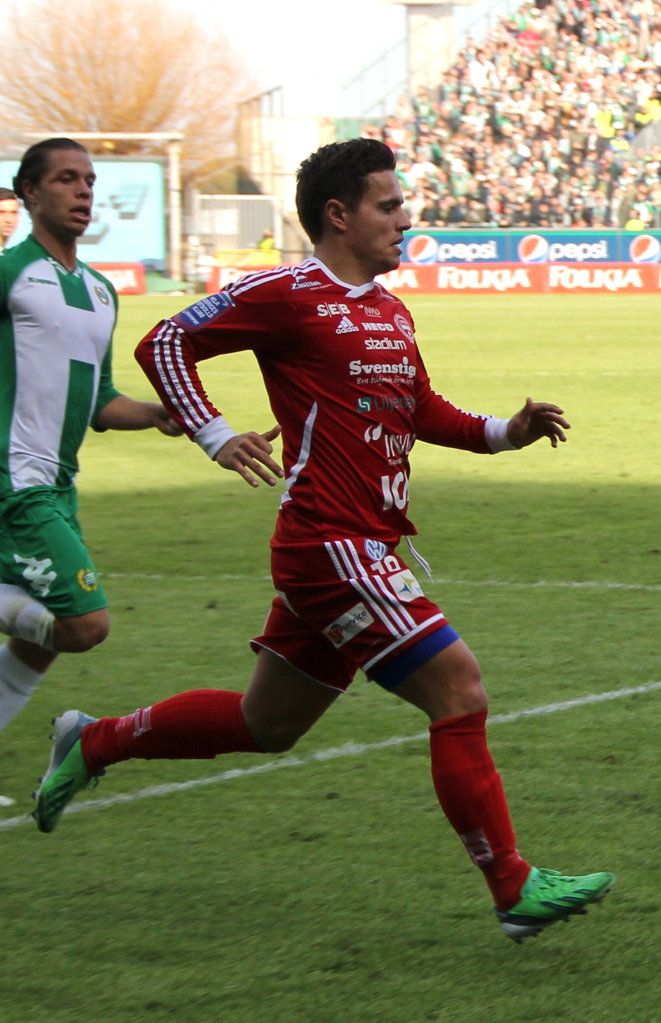 IFK Värnamos Durim Berisha.